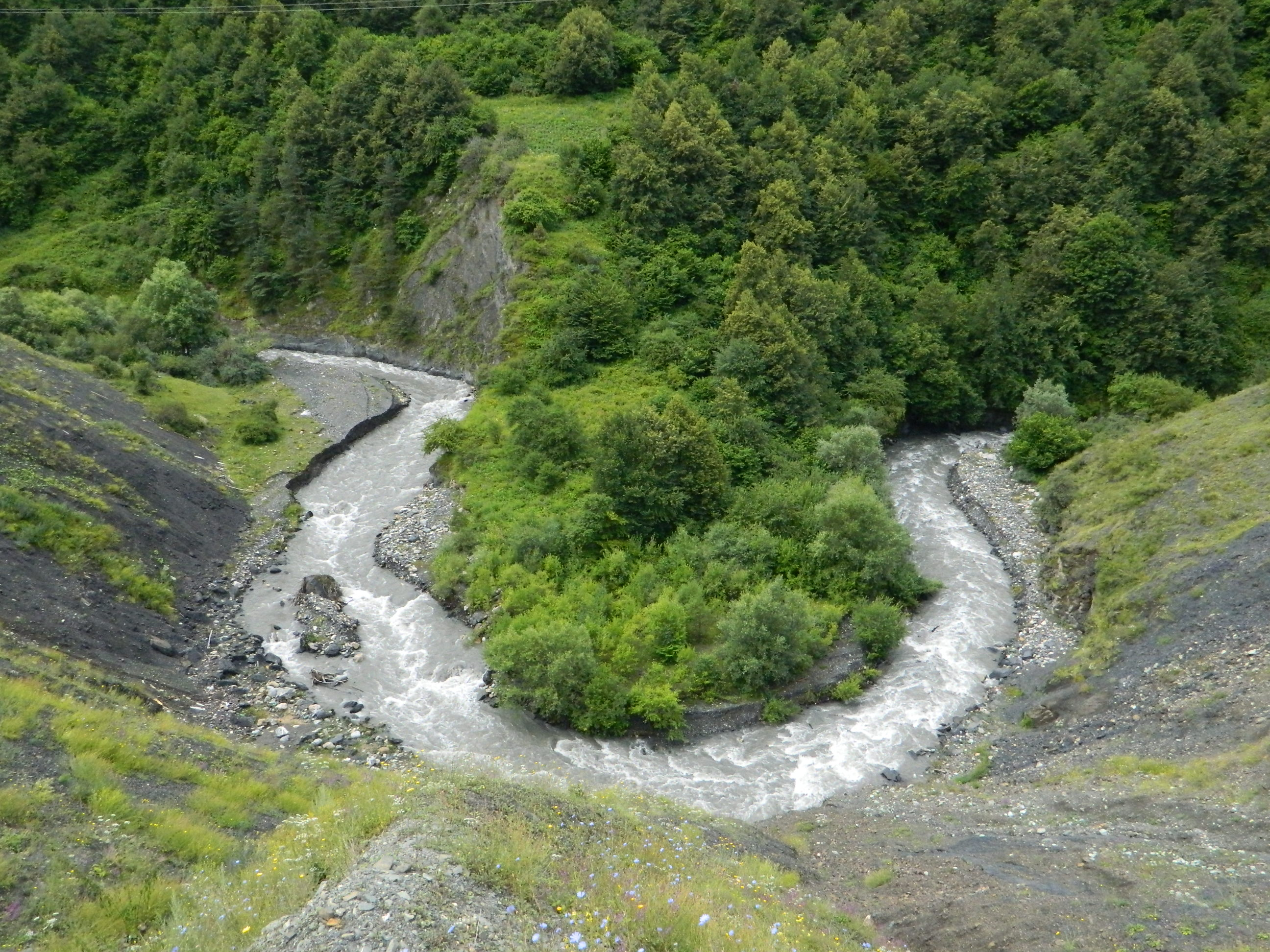 Река Армхи около пос.Ольгети